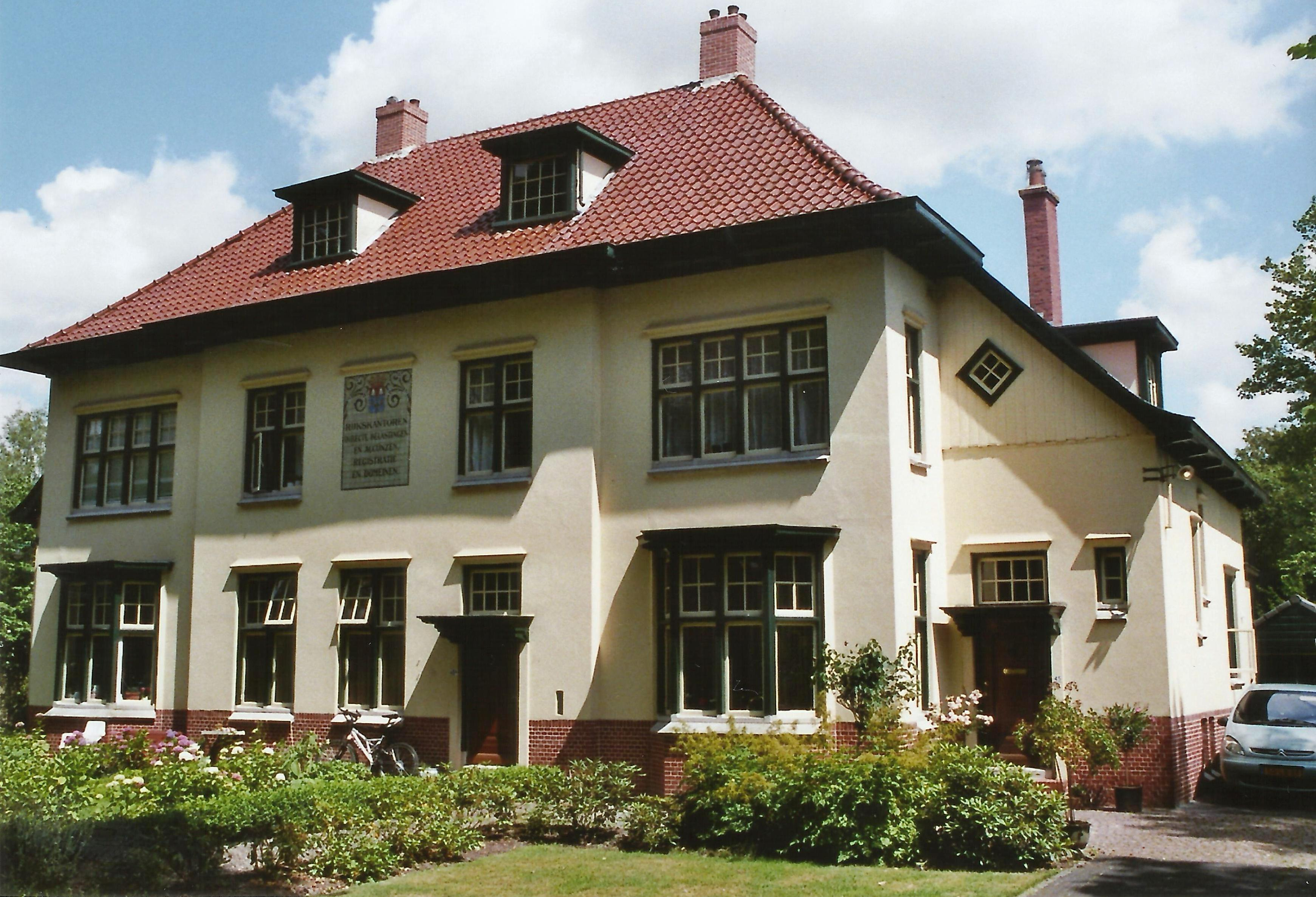 Zuidhorn oude belasting gebouw